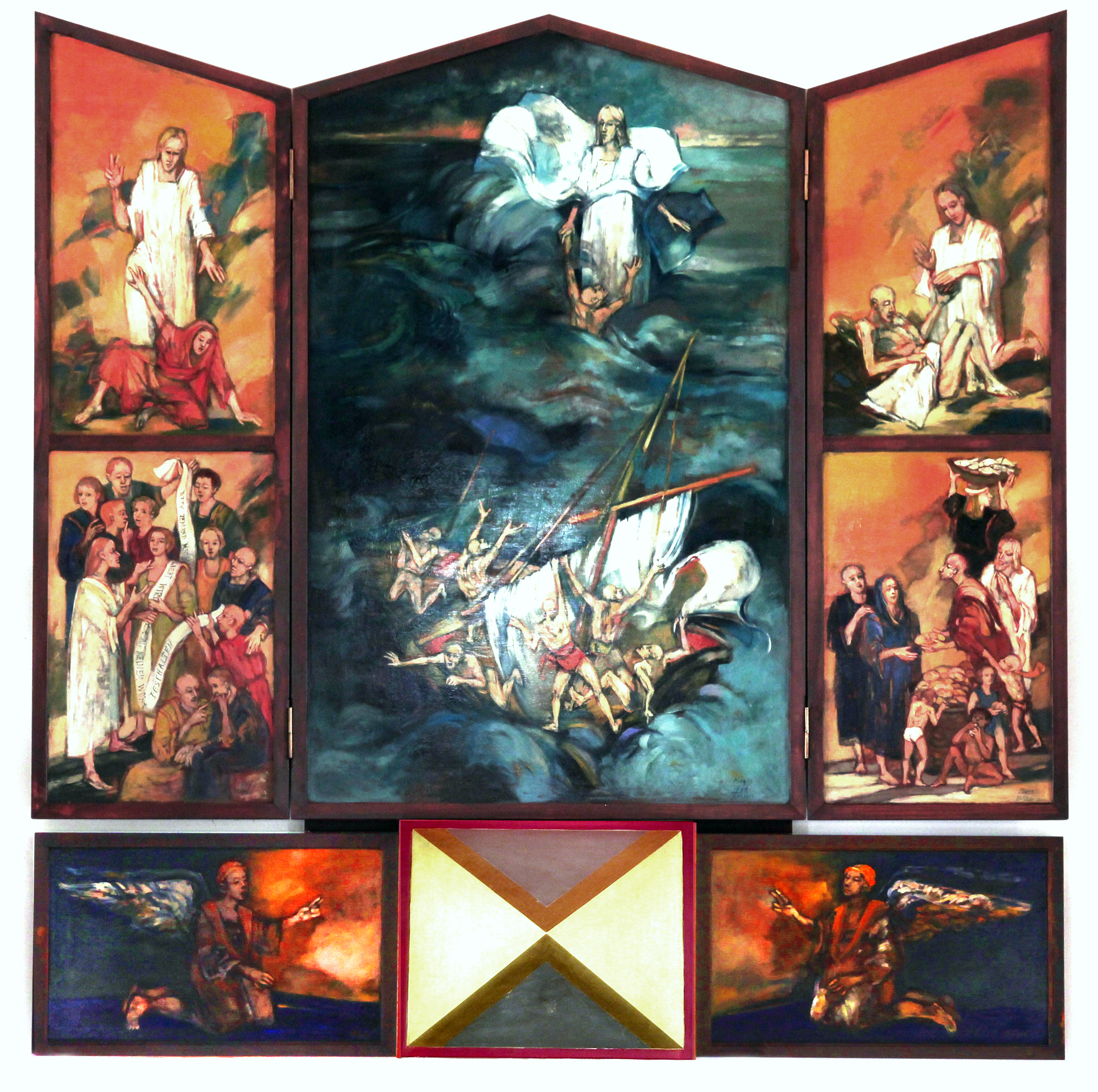 Römisch-katholische Pfarrkirche St. Judas Thaddäus (Eglisau), Altarbild von Agnes Mager